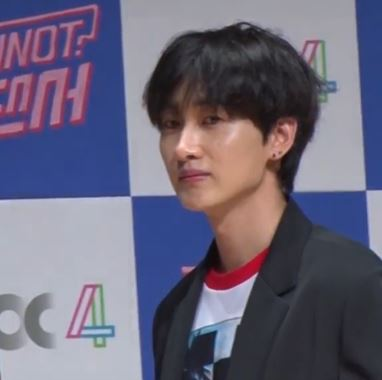 JTBC4 WHYNOT-더 댄서 제작발표회 은혁